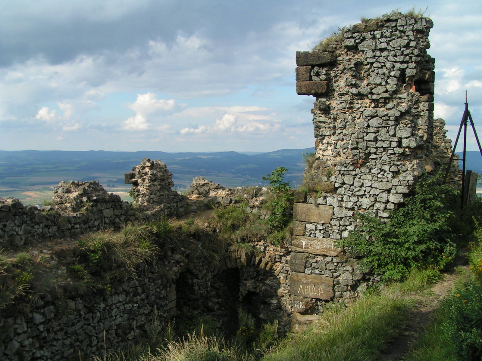 Hrad Ralsko nedaleko Mimoně Jiří Vackář 20:06, 15 May 2006 (UTC)